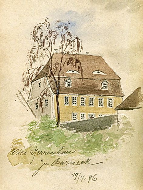 Das alte Herrenhaus des Gutes Barneck 1896